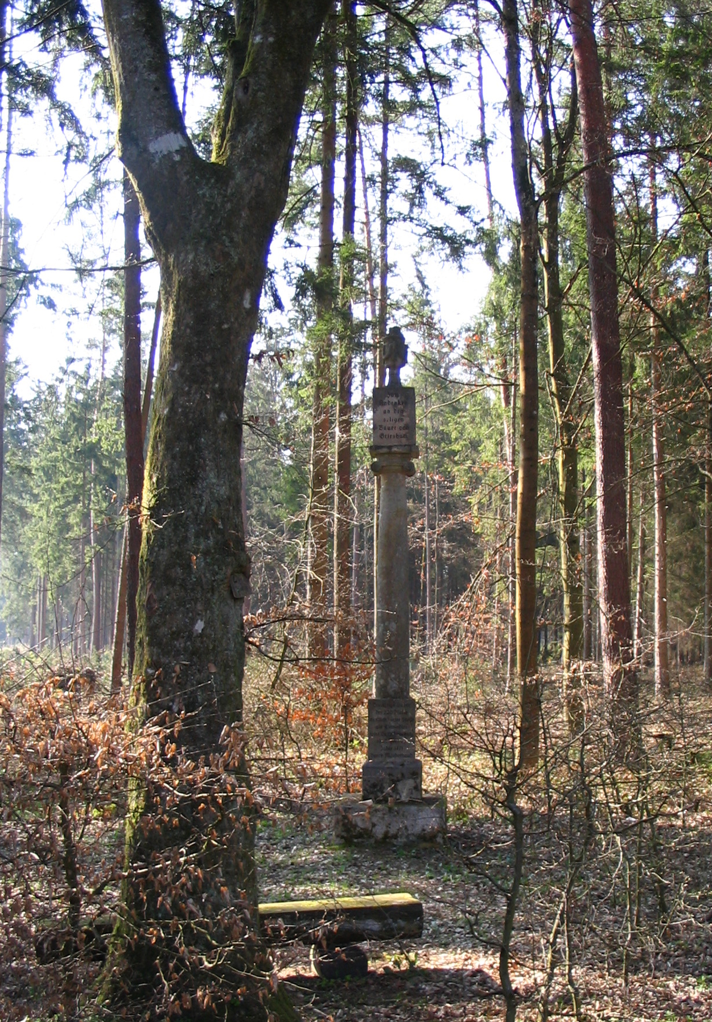 Gedenksäule zu Ehren des "Seligen Bauern von Vohburg" im Dürnbucher Forst bei Vohburg an der Donau. This is a photograph of an architectural monument. It is on the list of cultural monuments of Dürnbucher Forst (Niederbayern), no. ?